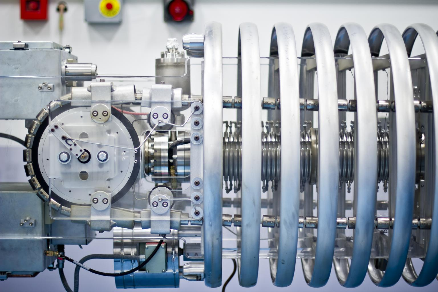 Laboratoire de l'École polytechnique, laboratoire des solides irradiés (LSI), accélérateur d'électrons Sirius (Système d'irradiation pour l'innovation et les utilisations scientifiques).